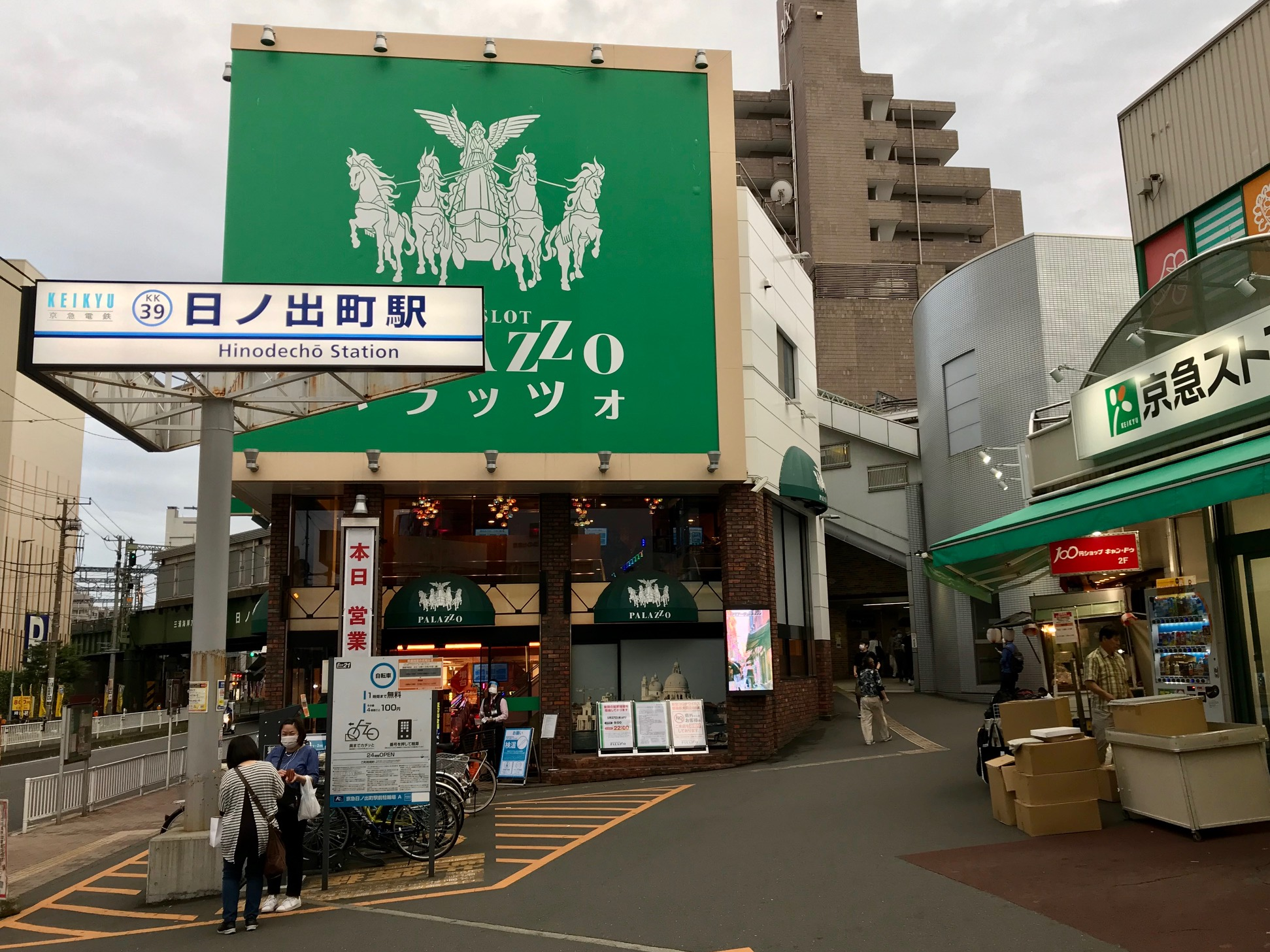 日ノ出町駅名標と駅舎（中央奥）